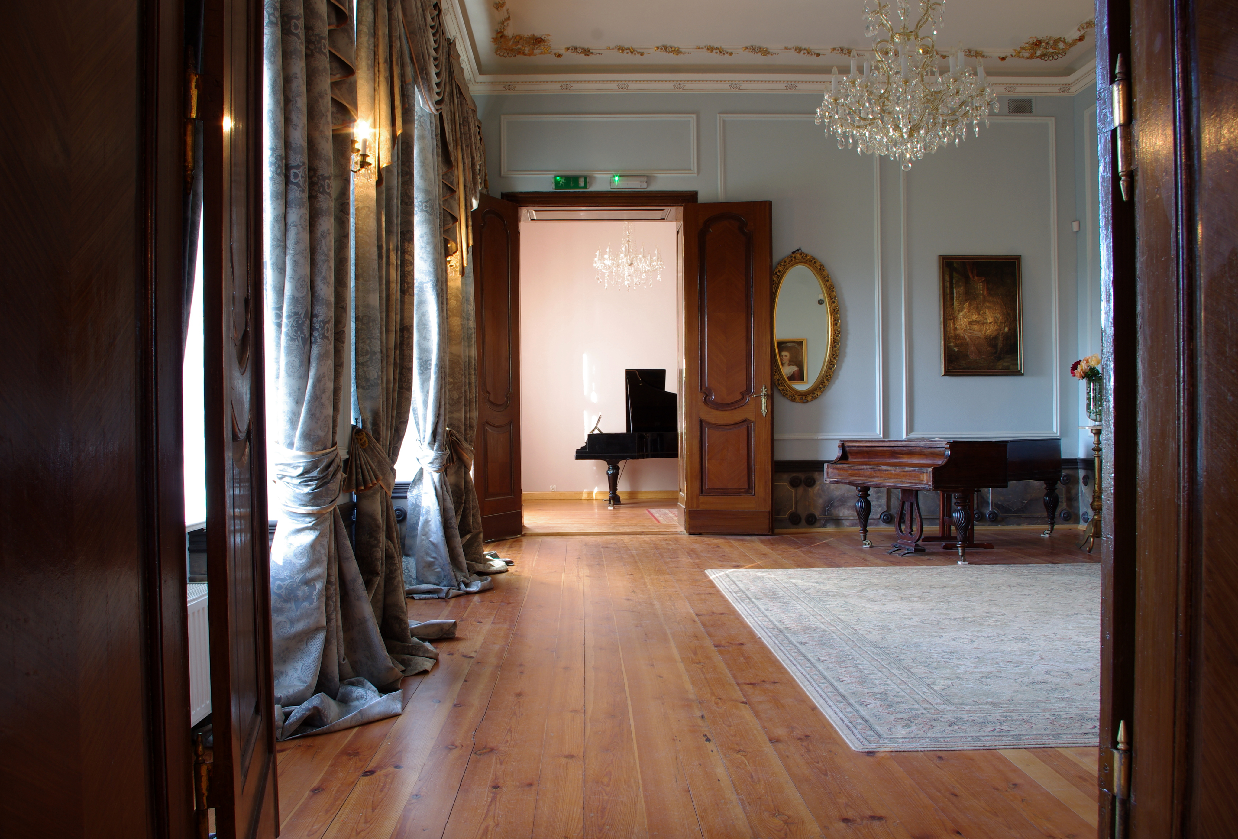 Ostromecko, pałac, tzw. Stary, 1758-1766